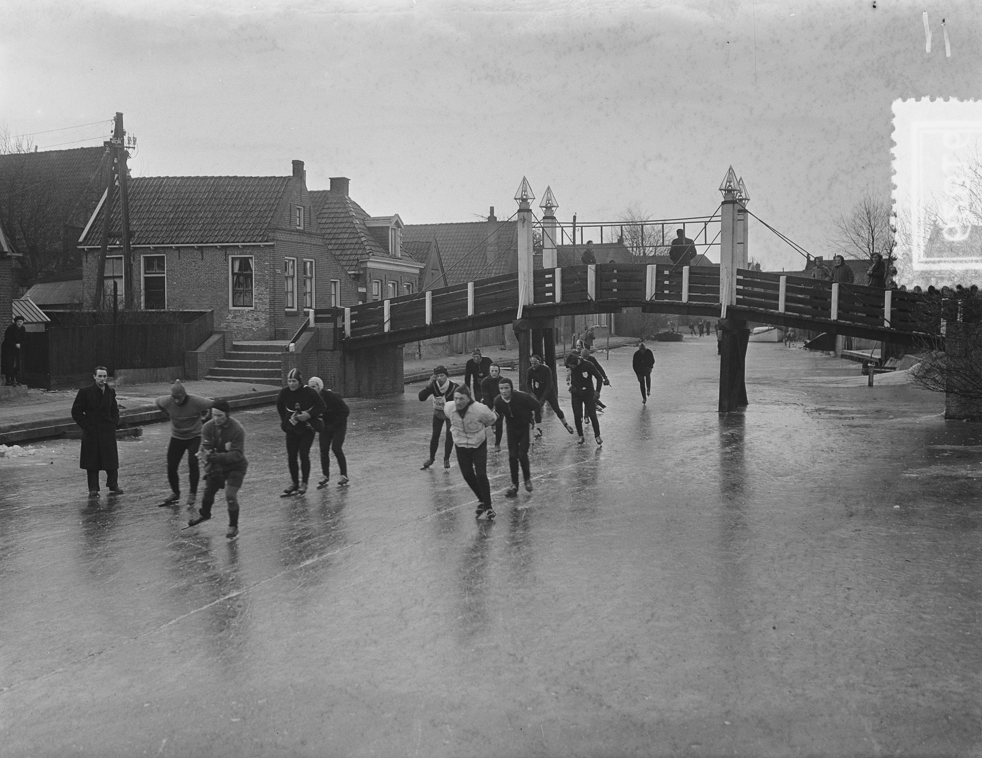 Collectie / Archief : Fotocollectie Anefo Reportage / Serie : [ onbekend ] Beschrijving : Elfstedentocht, reportage Datum : 3 februari 1954 Trefwoorden : Reportages Instellingsnaam : Elfstedentocht Fotograaf : Bilsen, Joop van / Anefo Auteursrechthebbende : Nationaal Archief Materiaalsoort : Glasnegatief Nummer archiefinventaris : bekijk toegang 2.24.01.09 Bestanddeelnummer : 906-2816